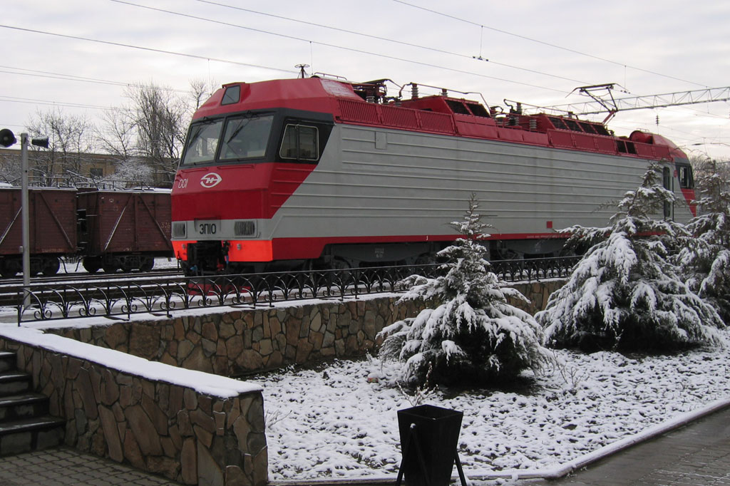 Электровоз ЭП10-001, Майкоп. см. фото 380777 в альбоме автора